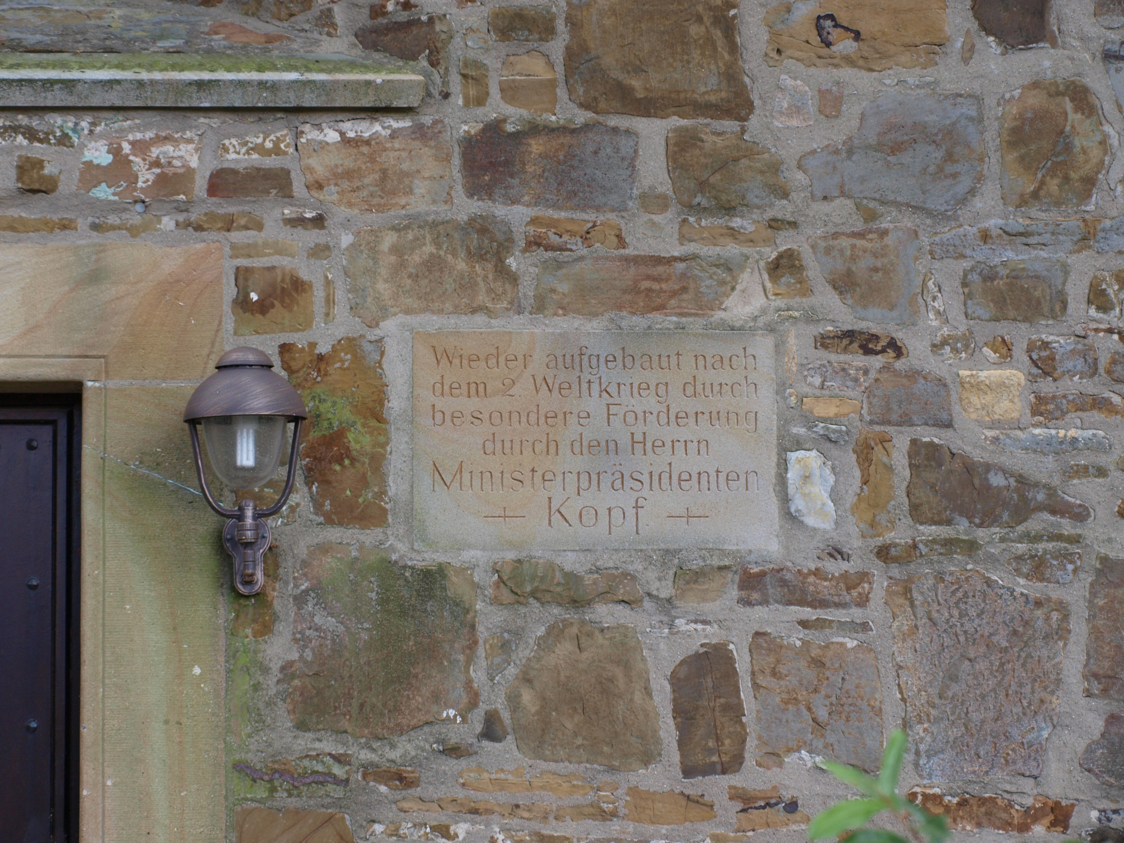 Menslage St. Marienkirche, Gedenkstein am Nordeingang